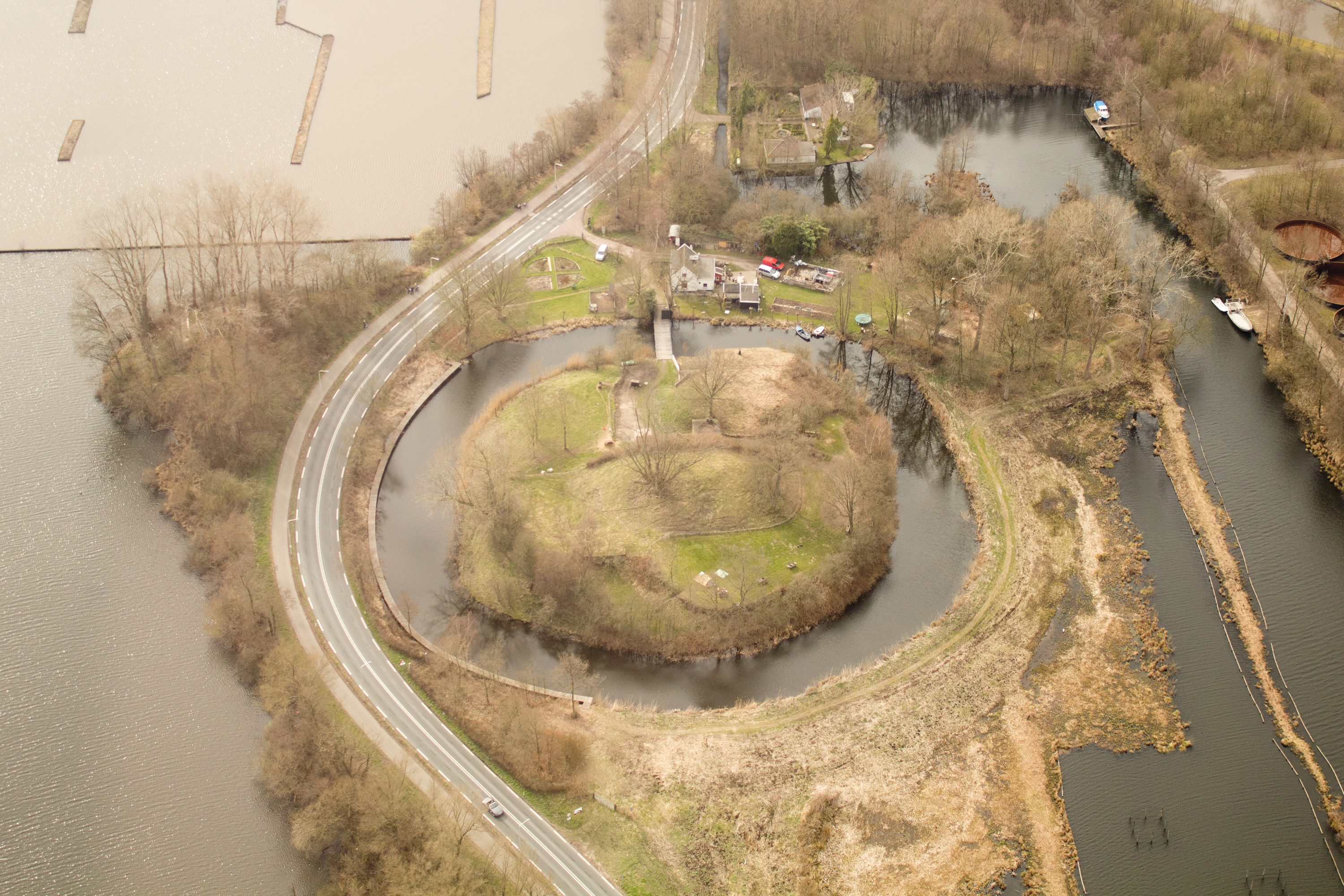 Fort Spion, Loosdrecht. Met dank aan Jeroen Komen.